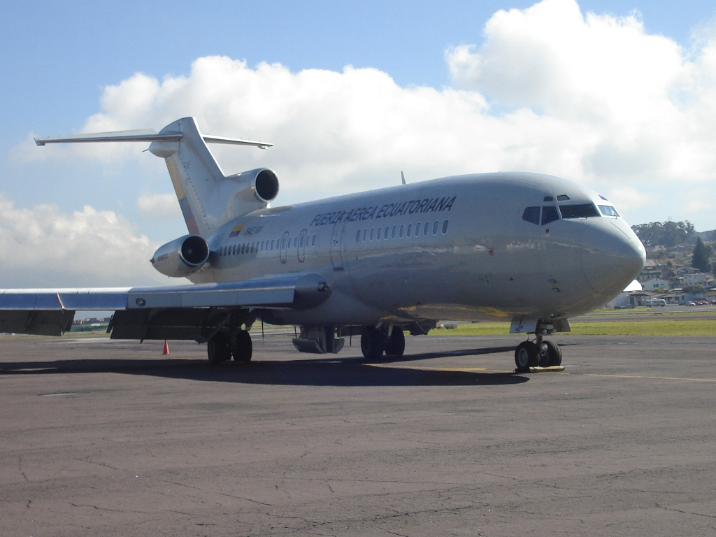 Avion Boeing 727